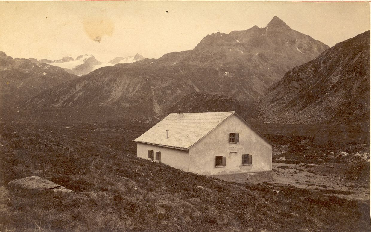 Madlenerhaus in der Silvrette im Jahr 1906